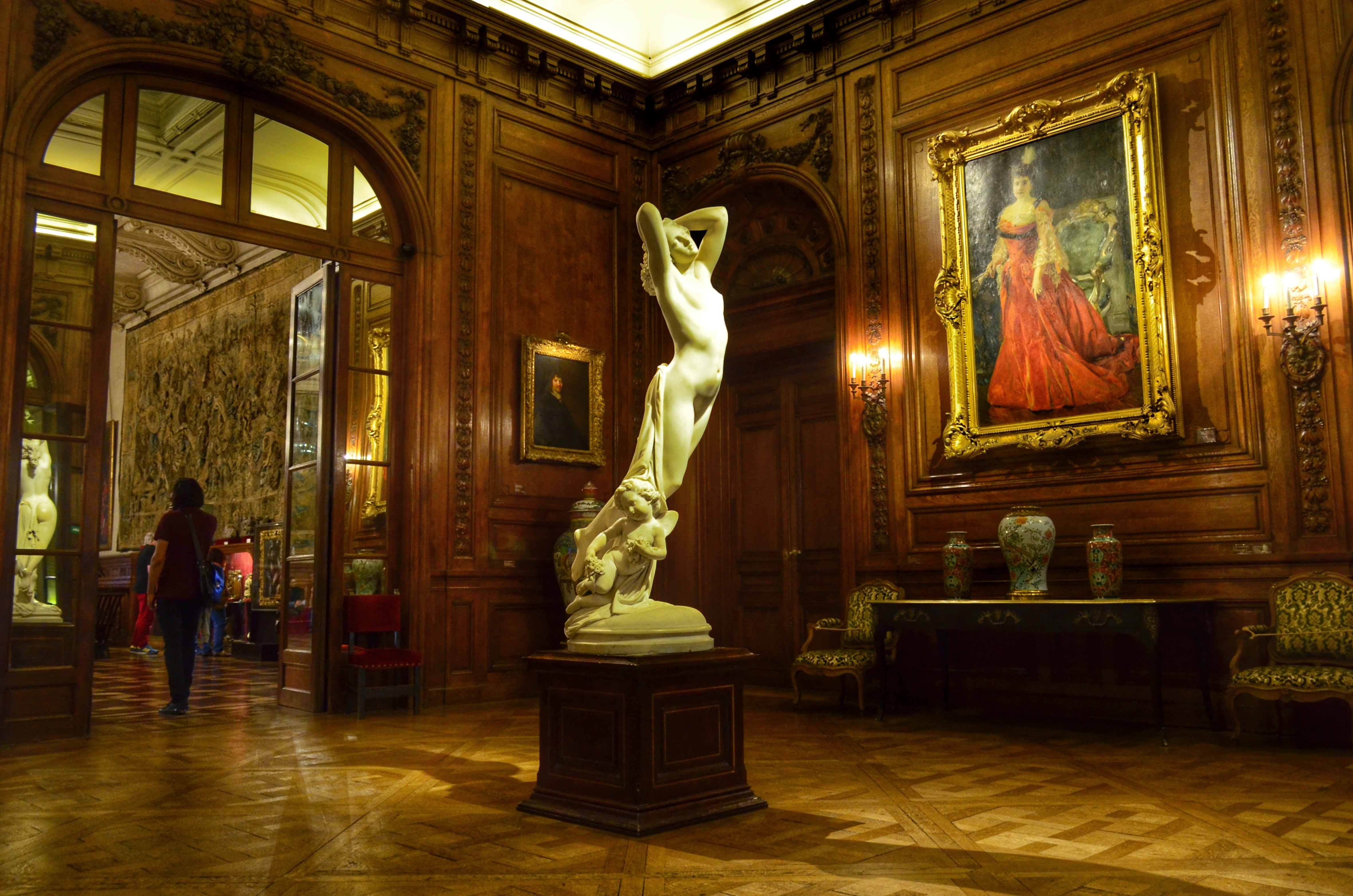 Edificio: Museo de arte decorativo